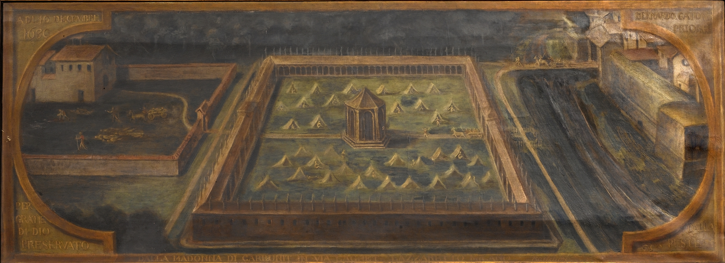 Il Lazzaretto di Milano nel 1630: a destra i bastioni con Porta Orientale e il Redefossi, al centro San Carlo al Lazzaretto con le tende degli appestati, a sinistra il foppone di San Gregorio (copia dalla Madonna dei Tencitt in via Laghetto del 1630)